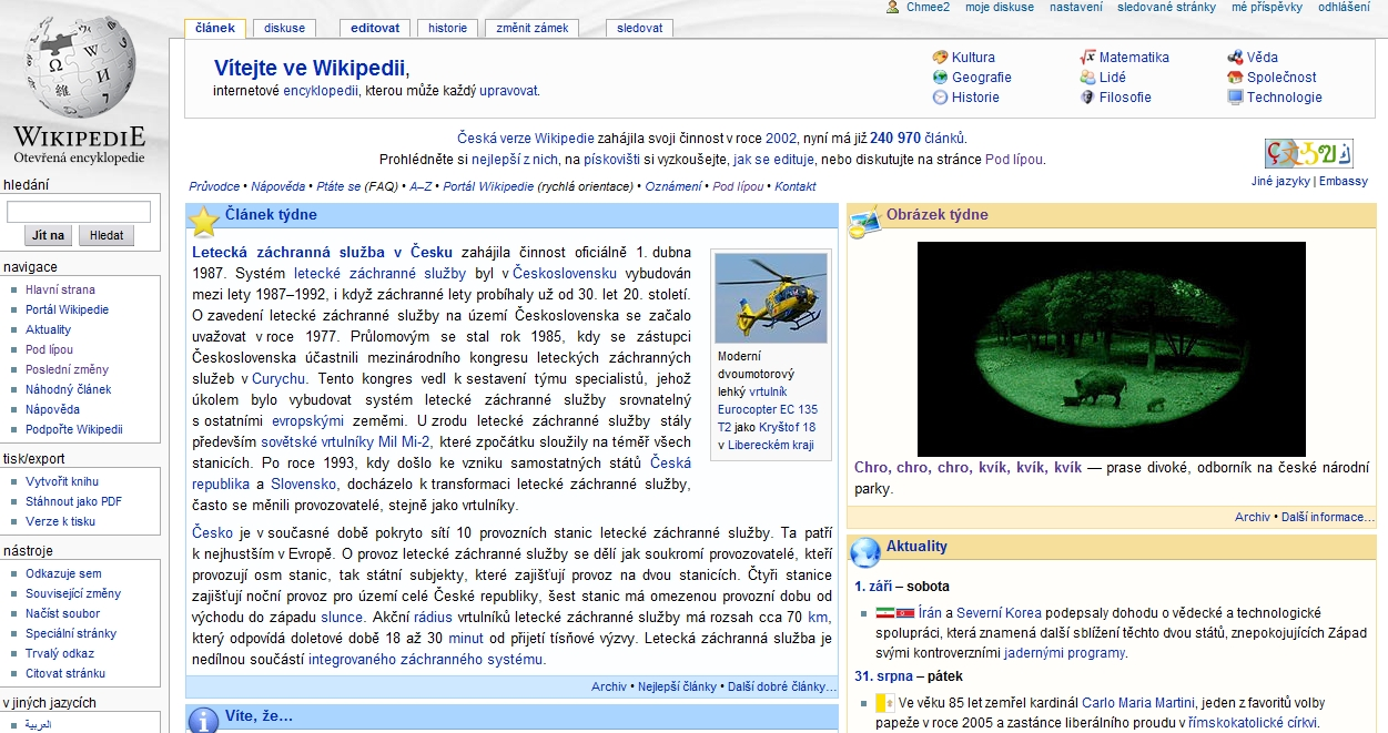 Hlavní strana české Wikipedie s obrázkem týdne, který byl součástí reklamy na kampaně WikiProjektu Chráněná území pro přilákání nových editorů ke psaní české Wikipedie.